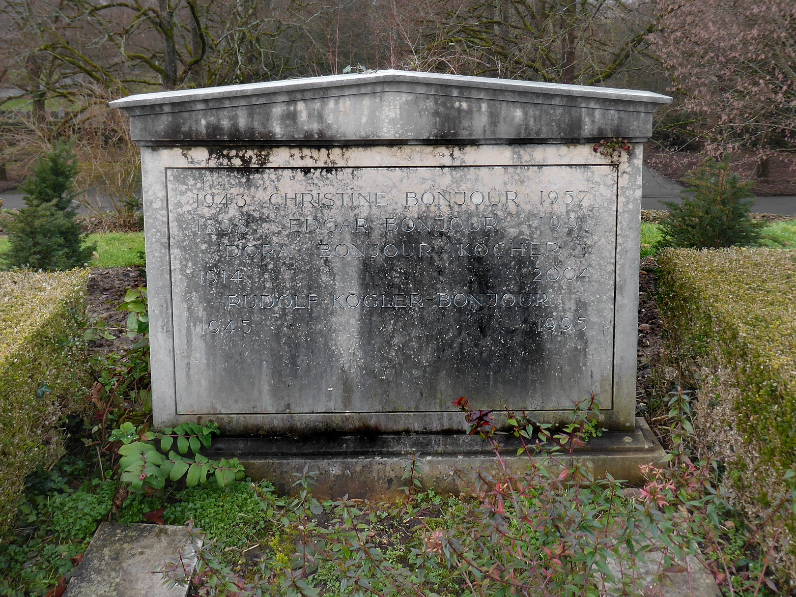 Edgar Bonjour-Kocher (1898–1991), Historiker, ordentlicher Professor für Schweizergeschichte und Neuere Allgemeine Geschichte an der Univ. Basel, Rektor, Autor der «Bonjour Berichte» Familiengrab auf dem Friedhof Hörnli, Riehen, Basel-Stadt